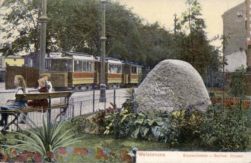 Berlin-Weißensee, Berliner Allee